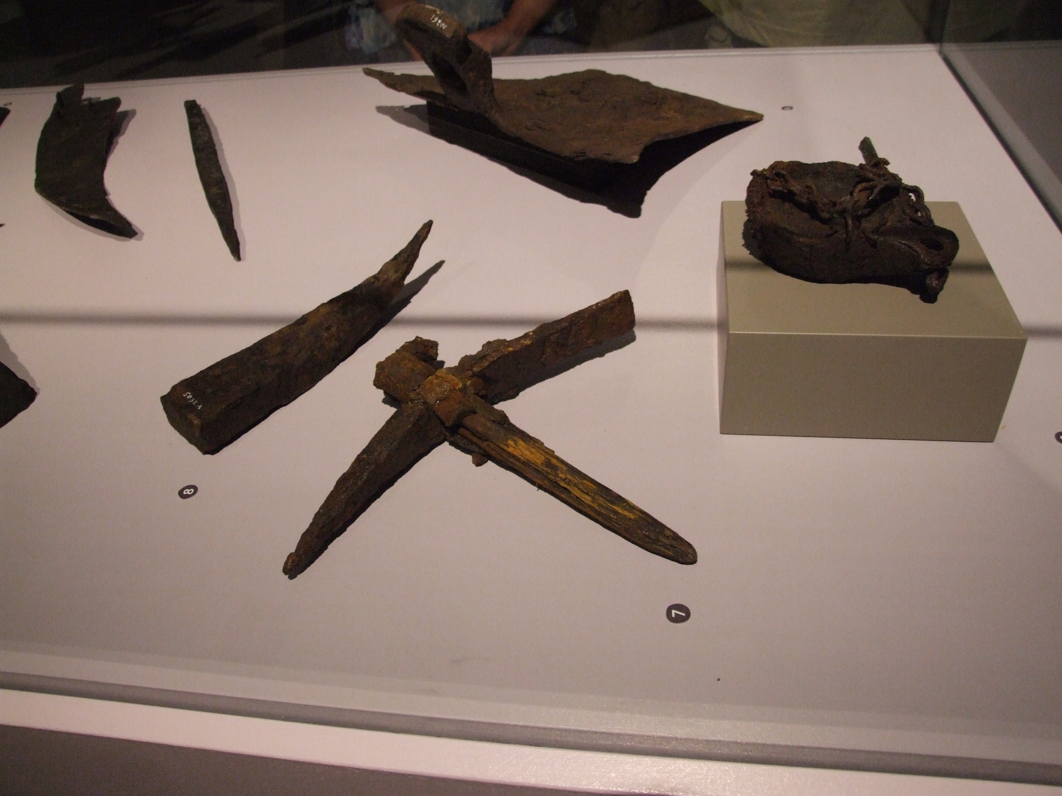 Spitzhacke und Pickel aus Pompeji, 79 n.Chr.; Pompeji-Ausstellung 2007, Europäischer Kulturpark Bliesbruck-Reinheim, pickaxe from Pompeii